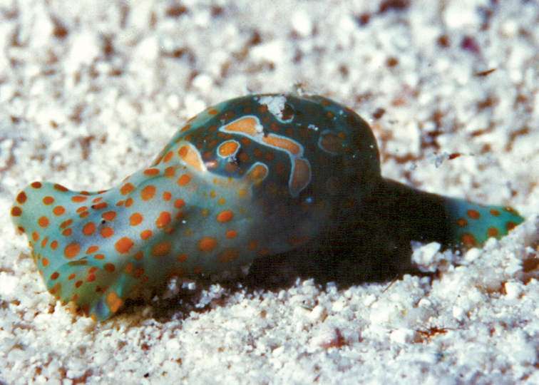 Haminoea cf cymbalum, 20 mm, Maldivas